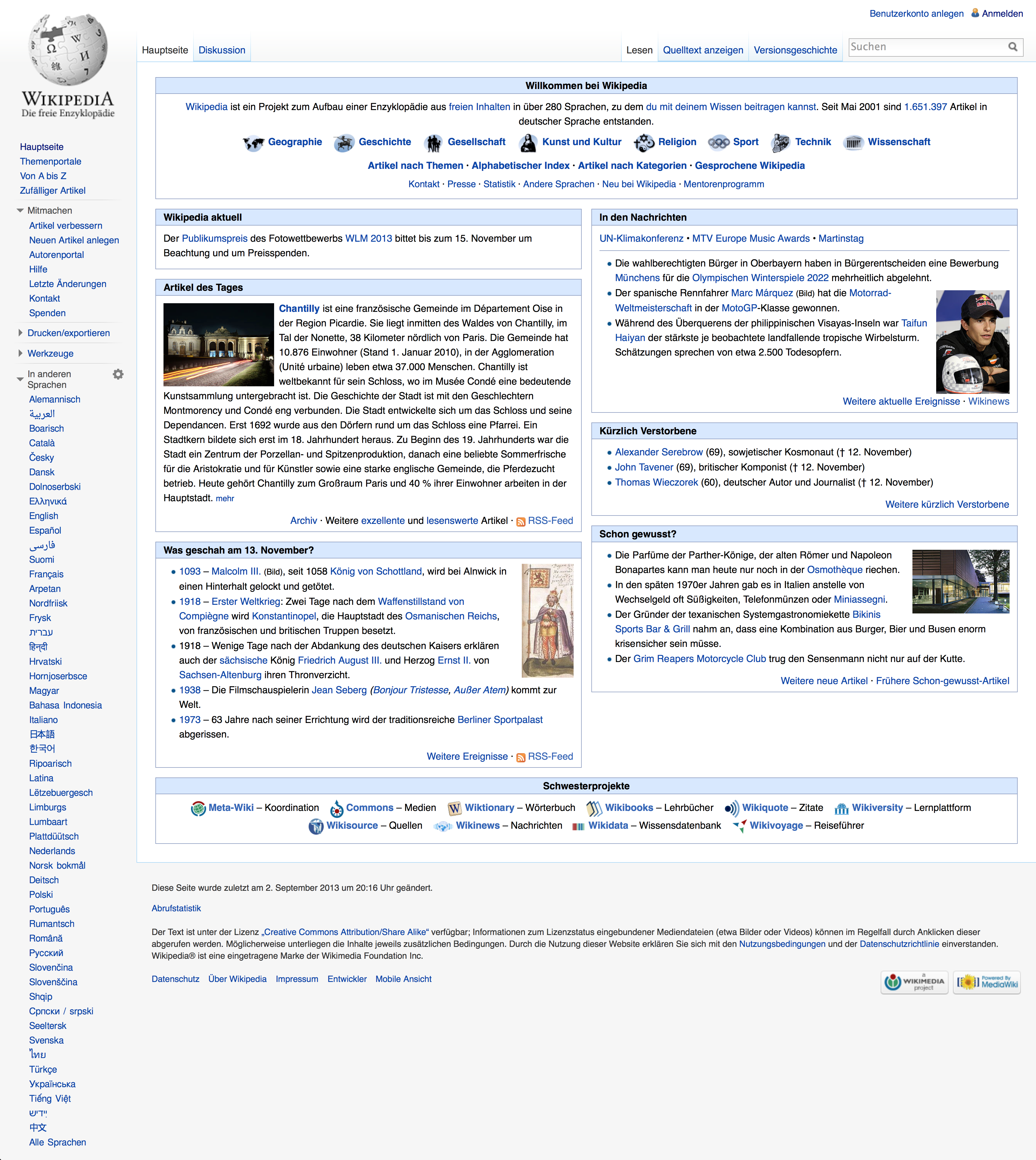 Hochauflösendes Bildschirmfoto der Hauptseite der deutschsprachigen Wikipedia am 13. November 2013.